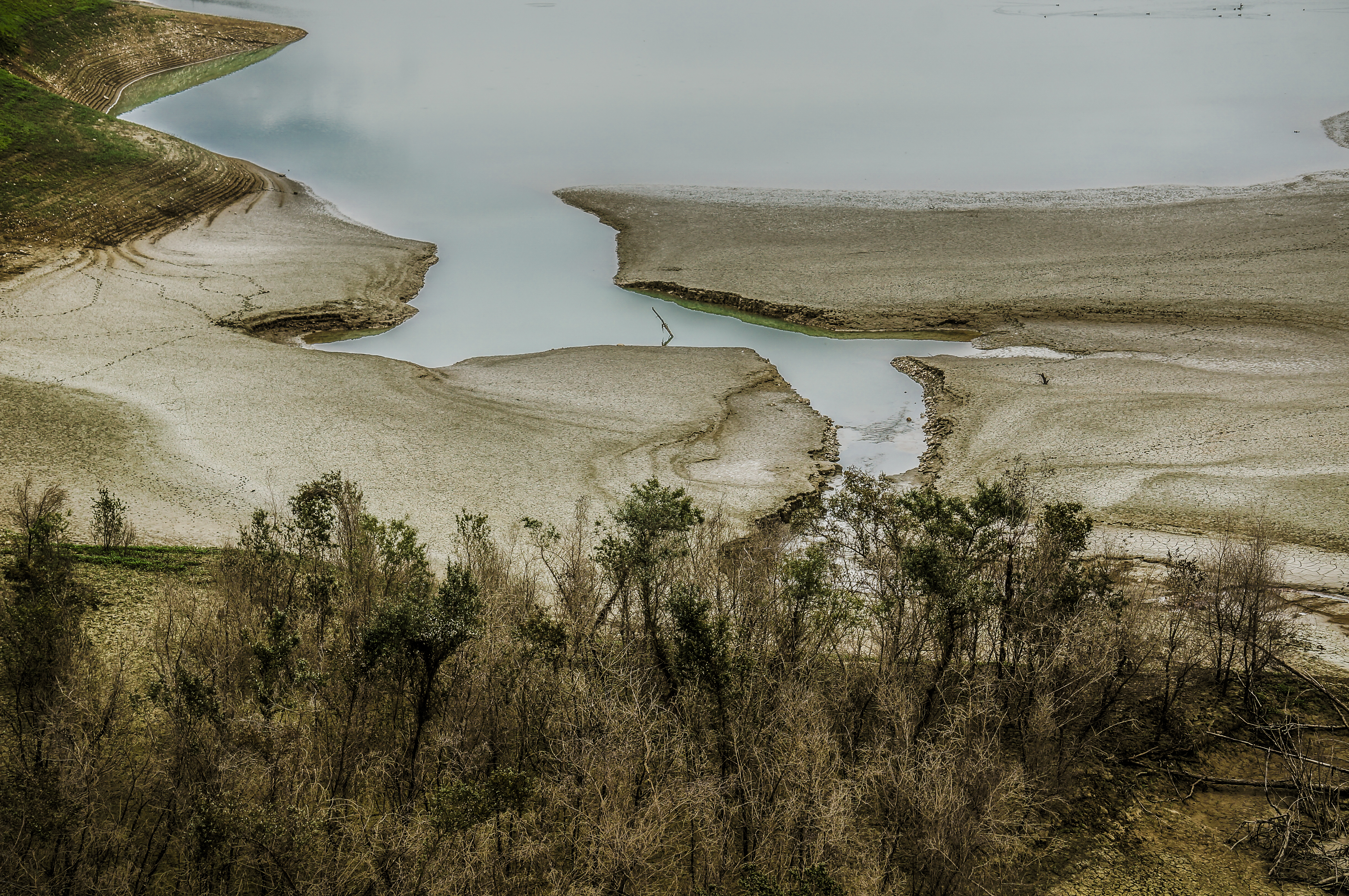 riserva naturale controllata Lago di Penne This is a photo of a monument which is part of cultural heritage of Italy. The authorisation for taking photos of this object was provided by the World Wide Fund for Nature Italy.